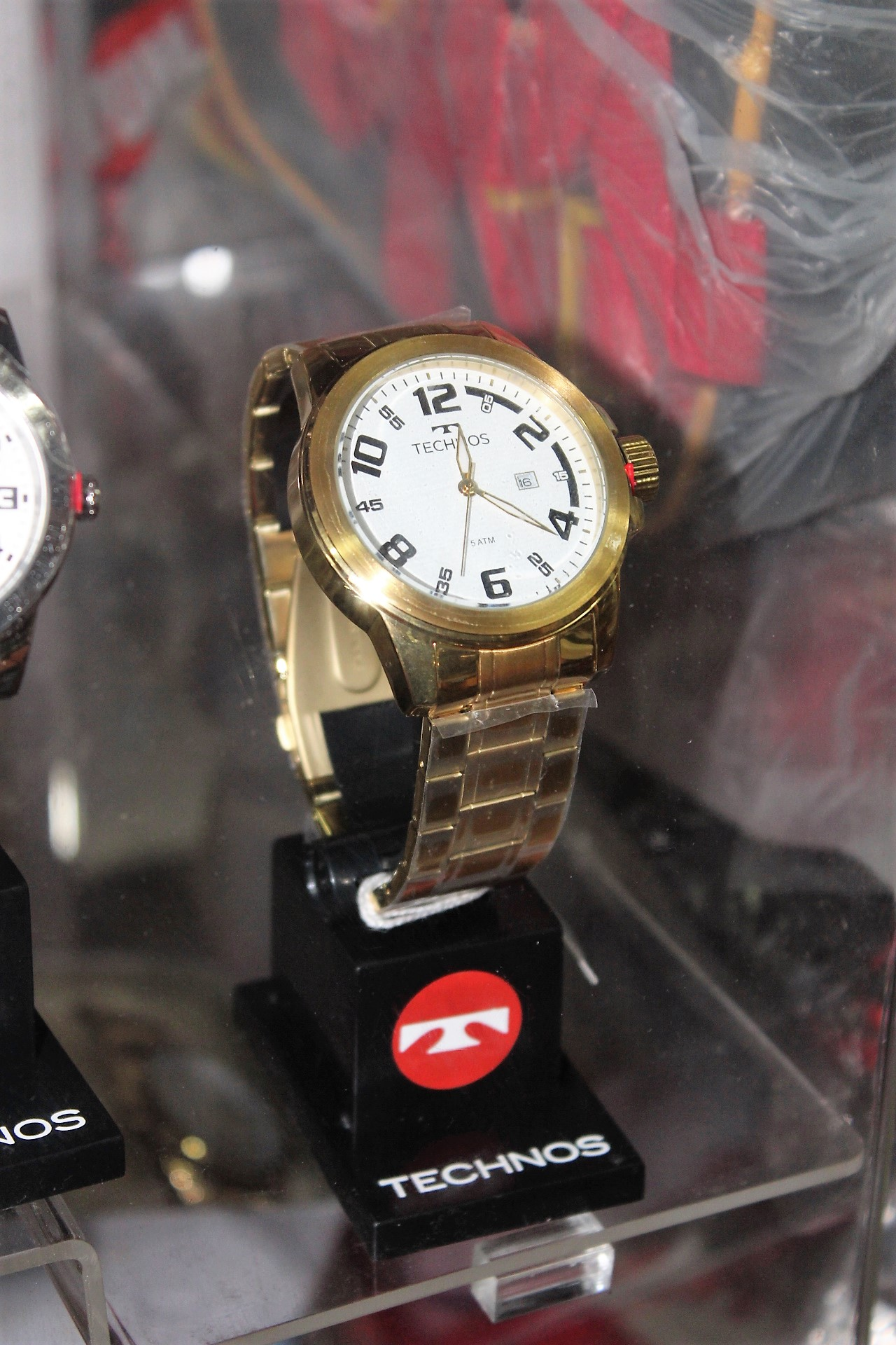 Relógio da Technos numa vitrine de relojoaria.